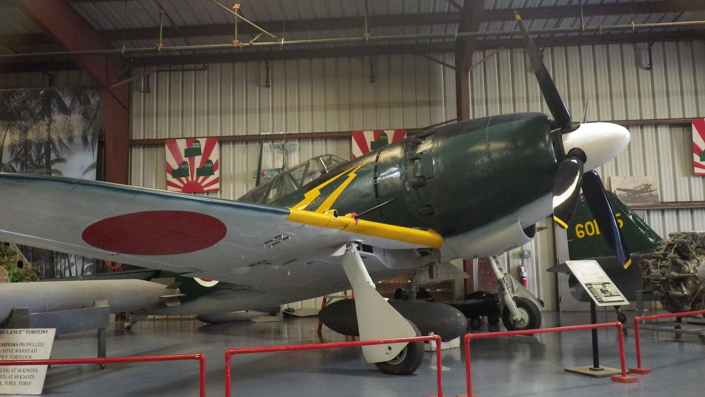 局地戦闘機 雷電 21型（J2M3）